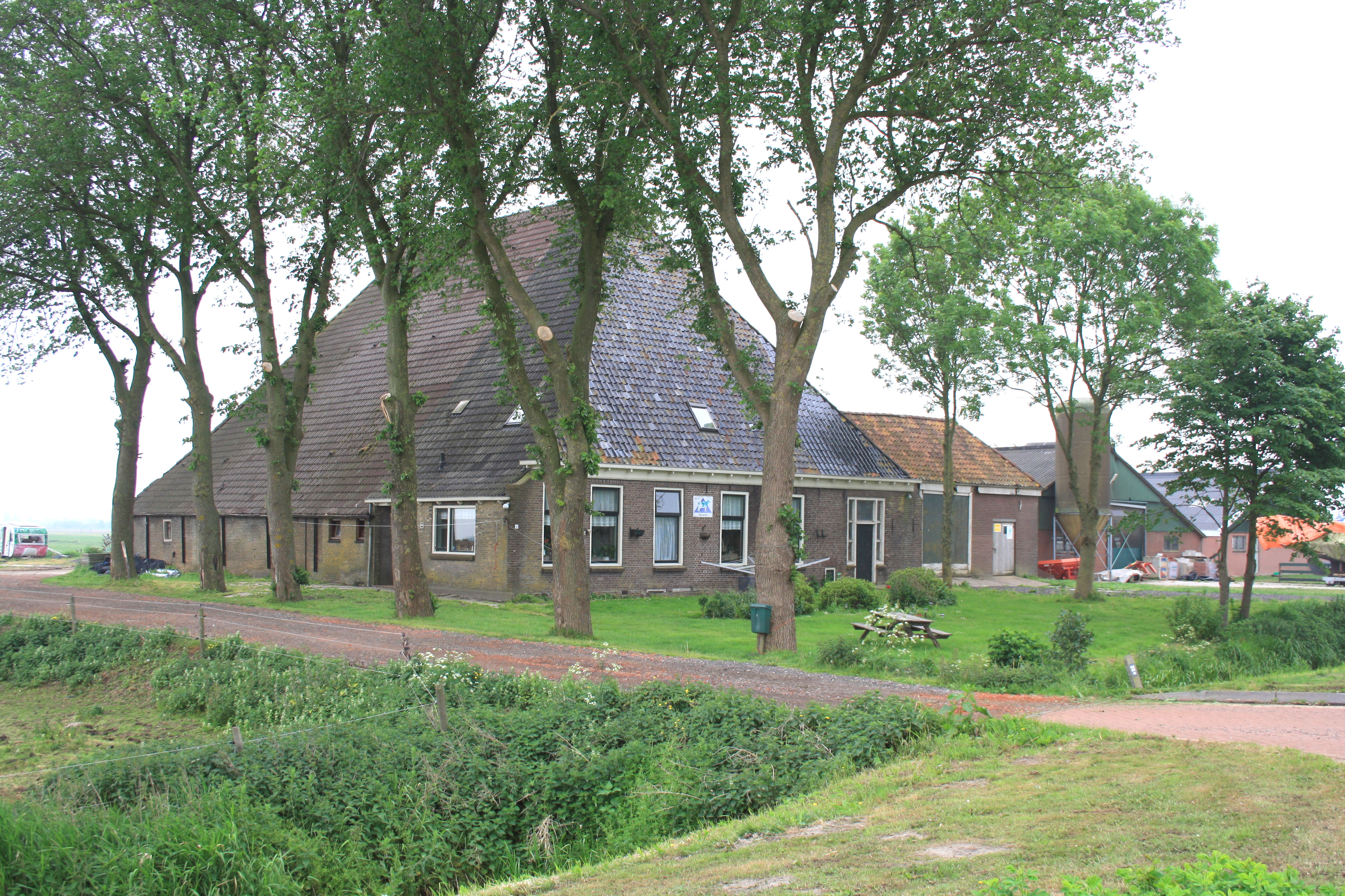 Friesland - Elahuizen - boerderij Mardijk